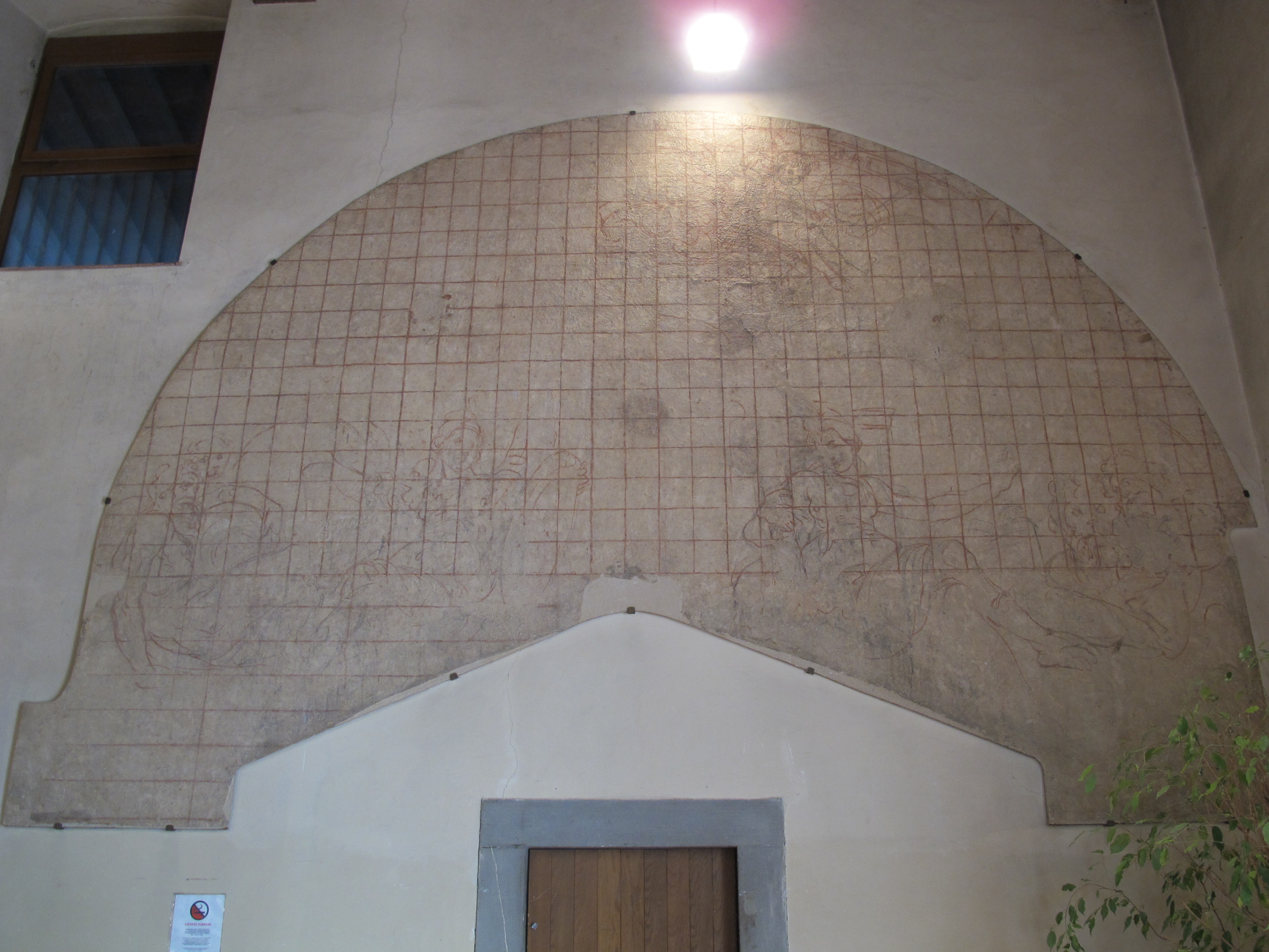 Spedale degli innocenti, sinopia